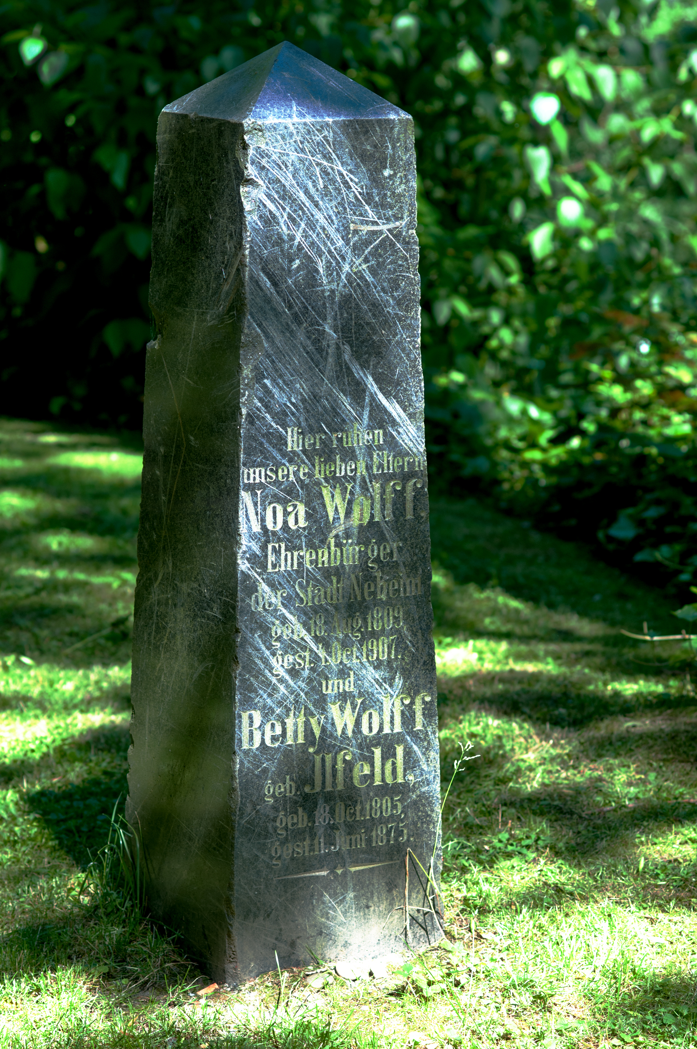 Jüdischer Friedhof Arnsberg-Neheim DL 347; Grabstele des Ehrenbürgers Noa Wolff und seiner Frau Betty